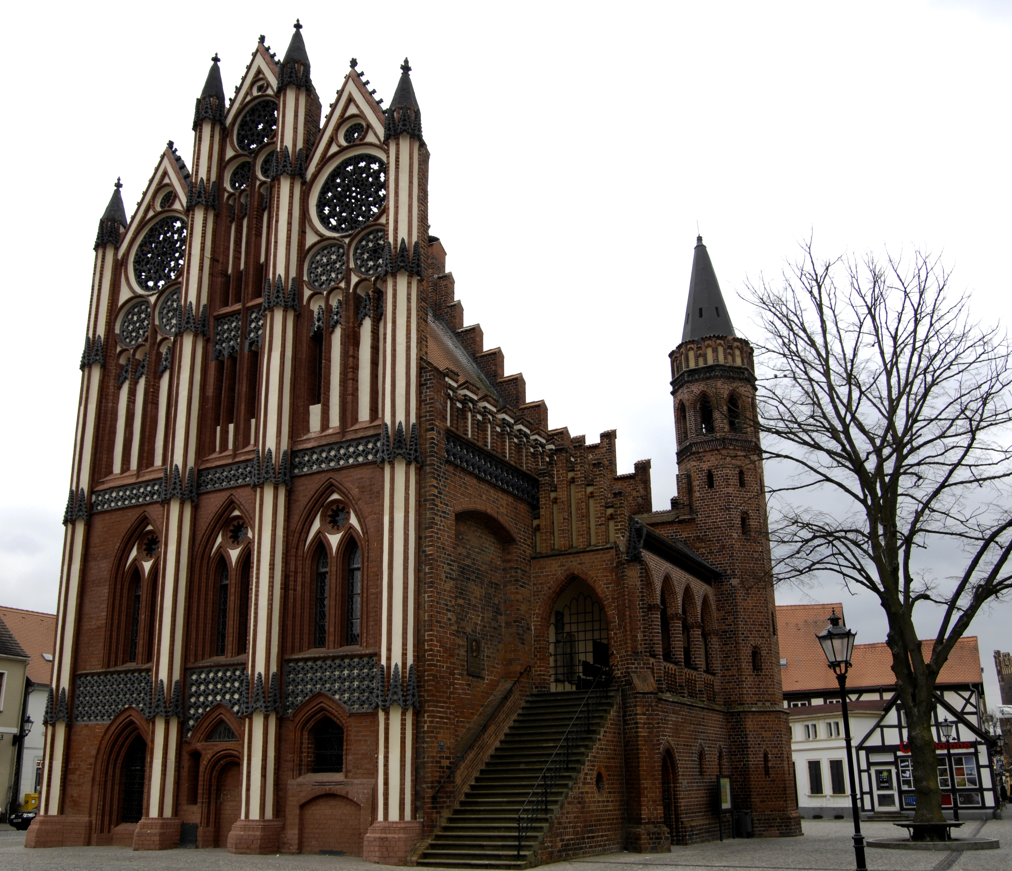 Tangermünde, Rathaus